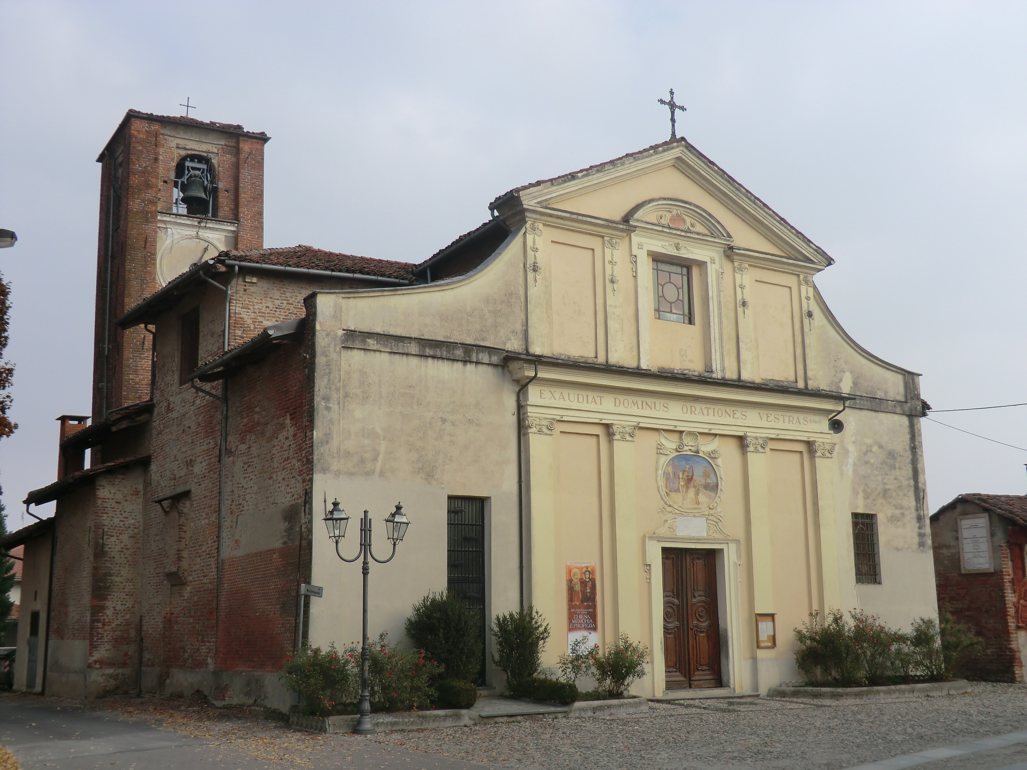 Villanova Solaro (Cuneo): chiesa di San Martino (XIV sec)